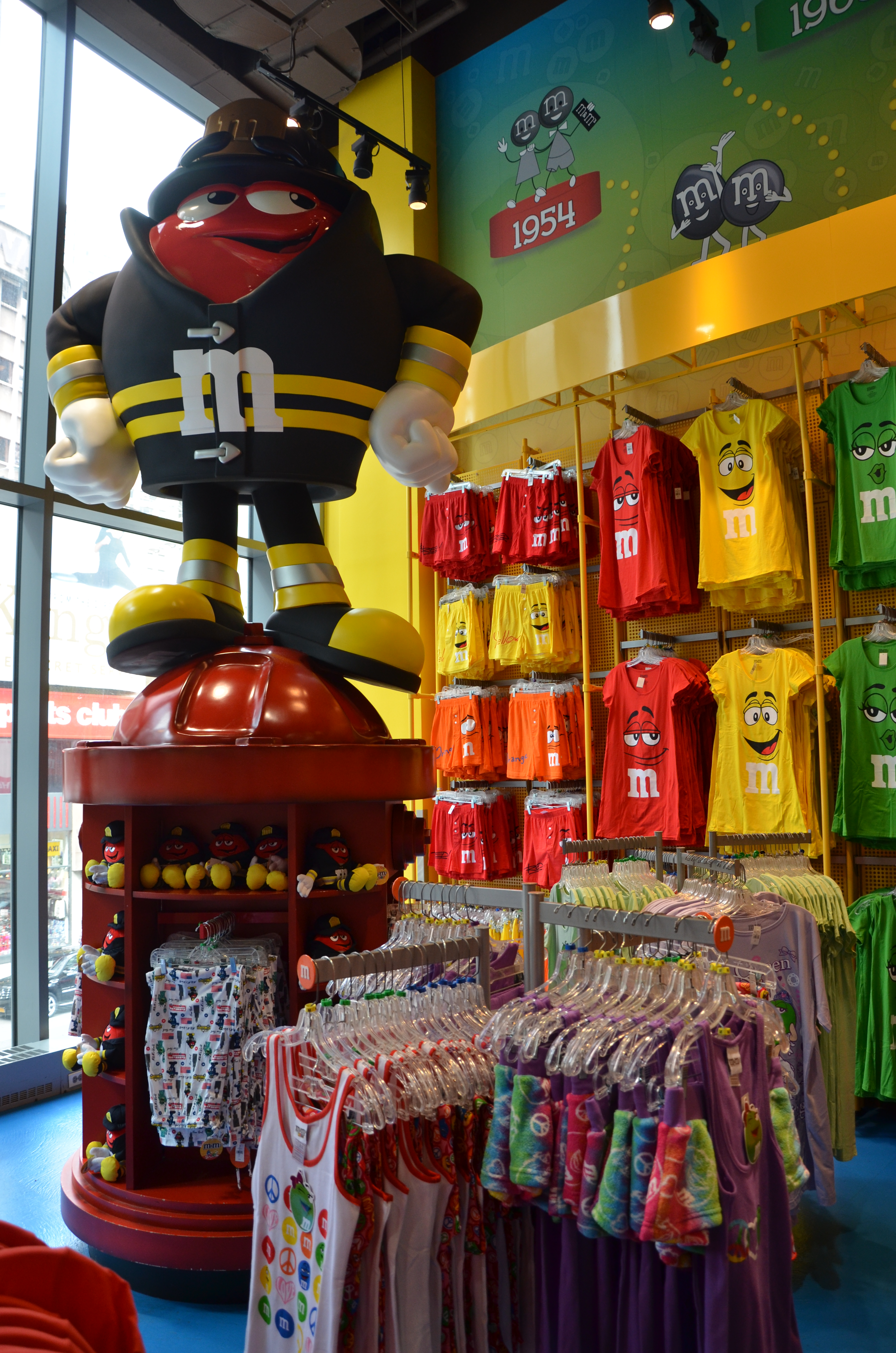 Binnen de M&M's Store in New York.